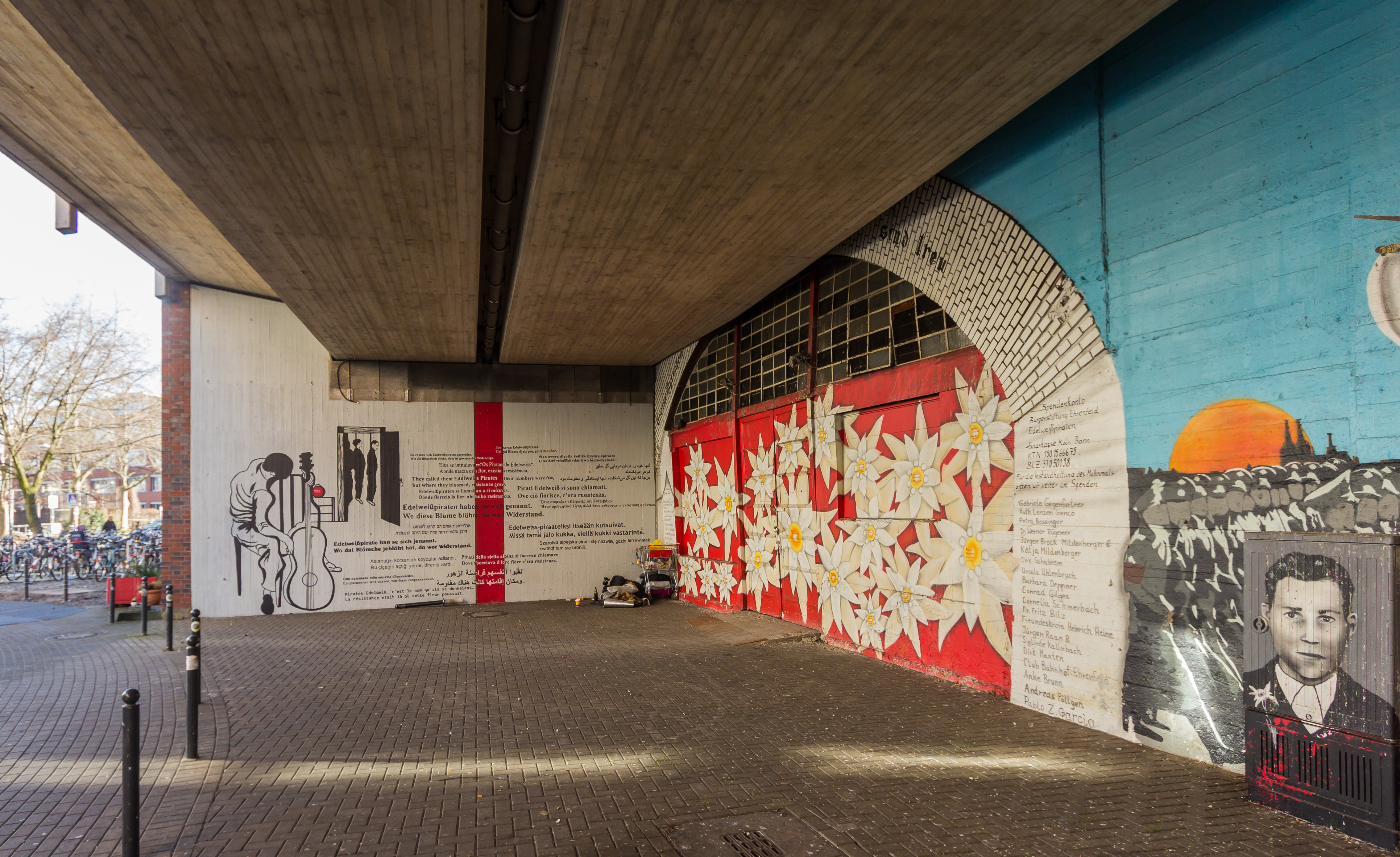 Wandgemälde unter den Bahnbögen am westlichen Ende der Bartholomäus-Schink-Straße in Köln-Ehrenfeld. Gezeigt werden Motive aus dem Leben der Ehrenfelder Gruppe, die zu den Edelweißpiraten im zweiten Weltkrieg gehörten.